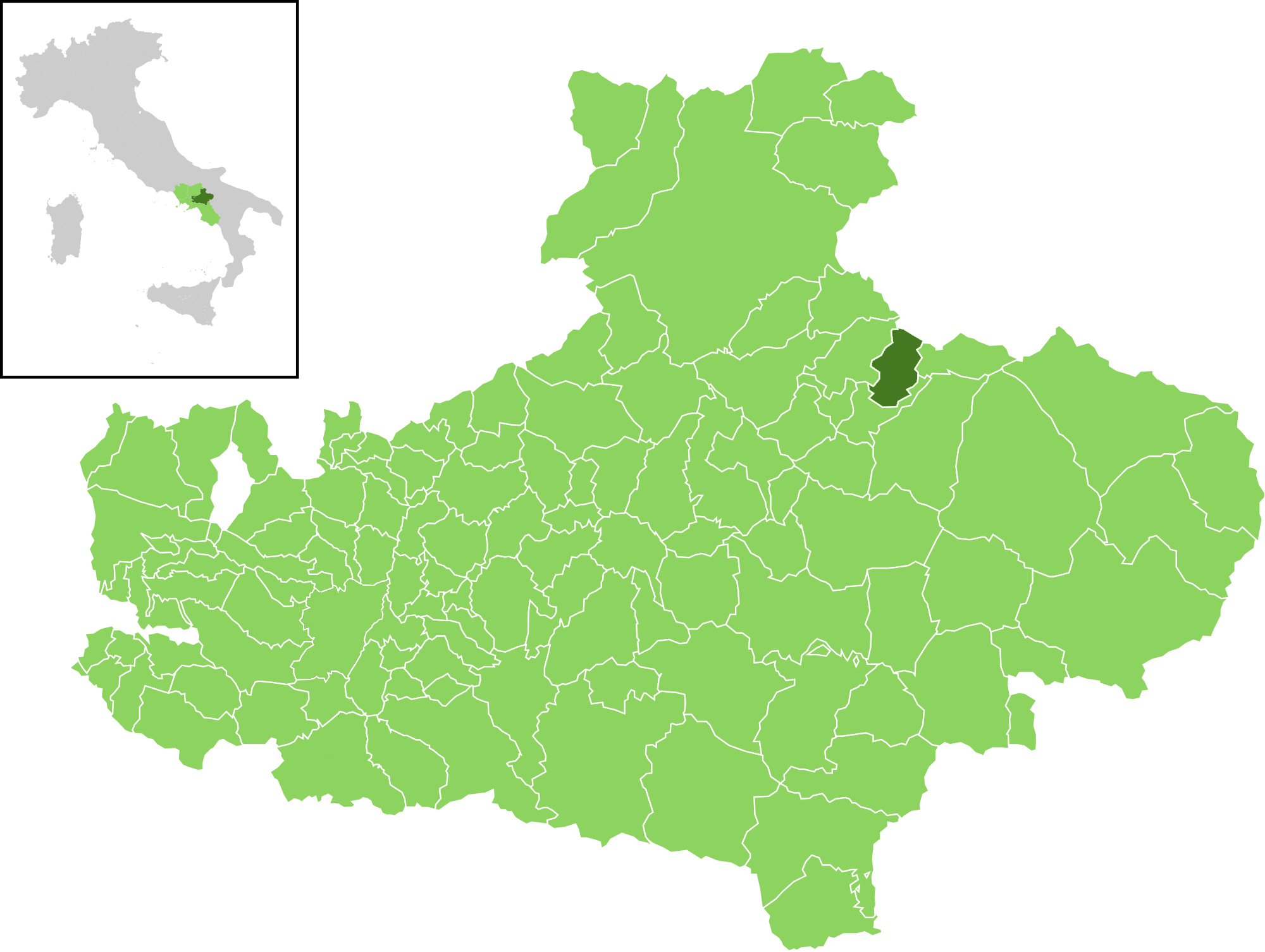 Posizione del comune all'interno della provincia di Avellino